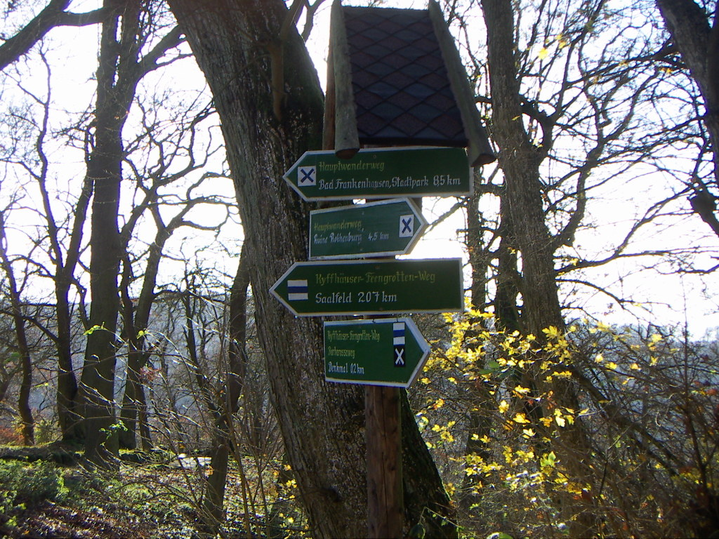 Fernwanderwegmarkierung des Feengrotten-Kyffhäuser-Wanderweges am Kyffhäuserdenkmal im November 2006